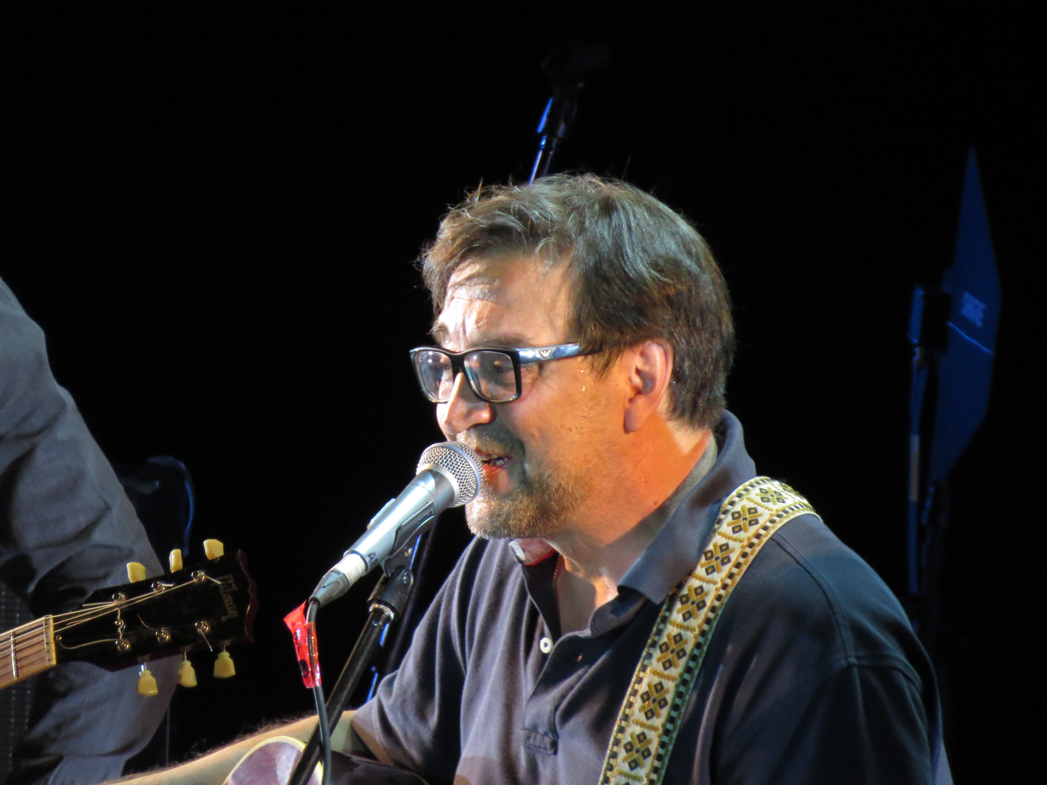 Благотворительный концерт «#РокУзник» в поддержку «узников 6 мая» в ТКЗ «Мир» 22 сентября 2013 года.